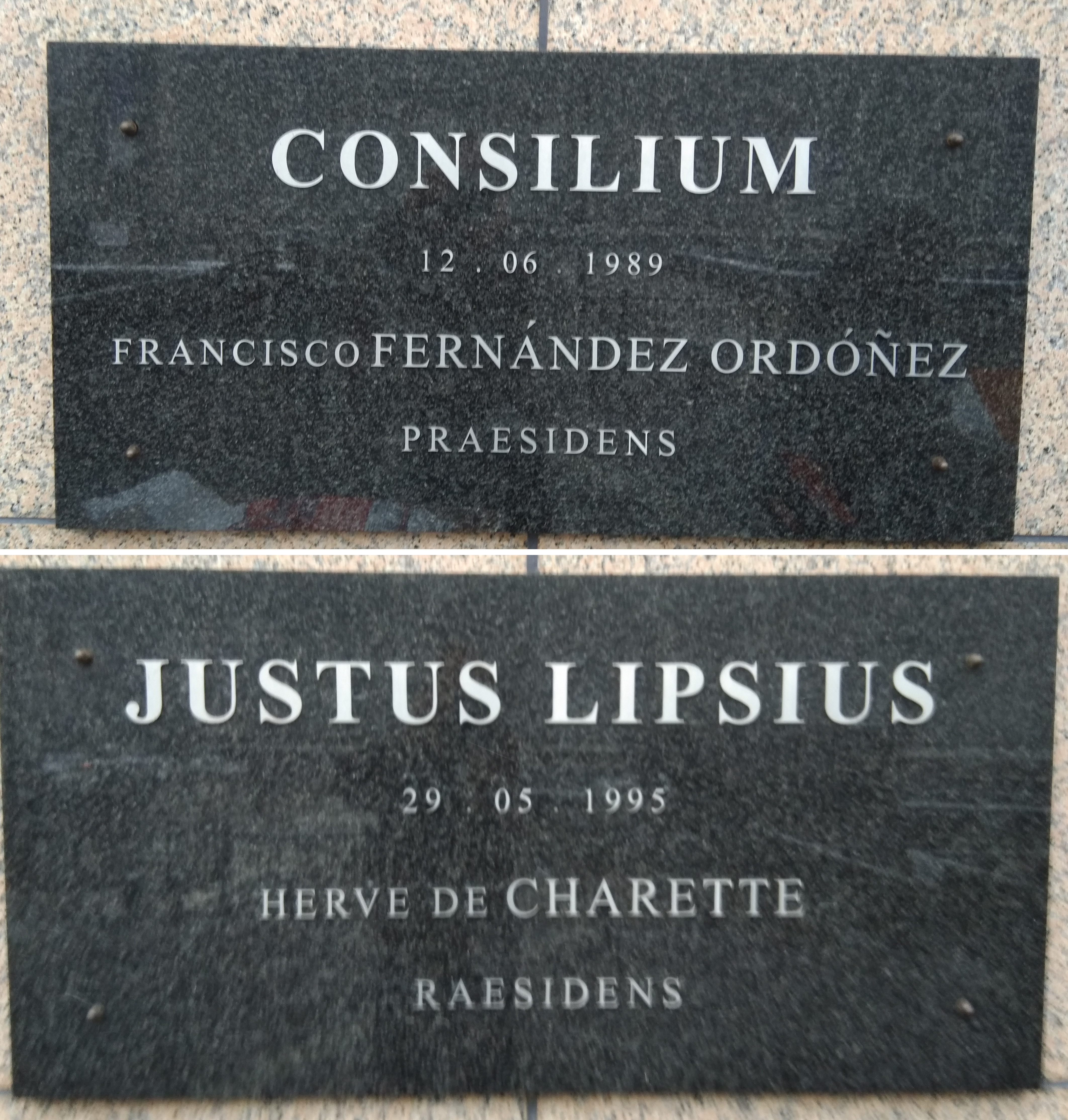 Inscriptiones ad aedificium Iusti Lipsii, sedem Consilii Bruxellis (dies initii finisque aedificationis indicantes)